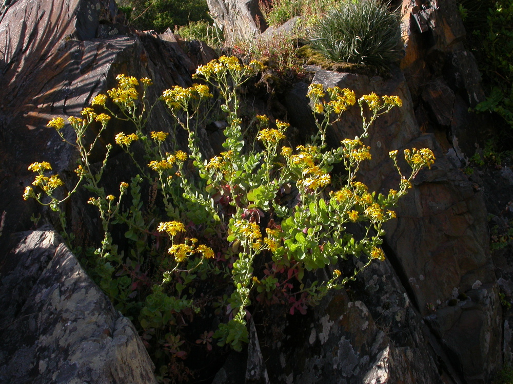 Senecio nigrescens